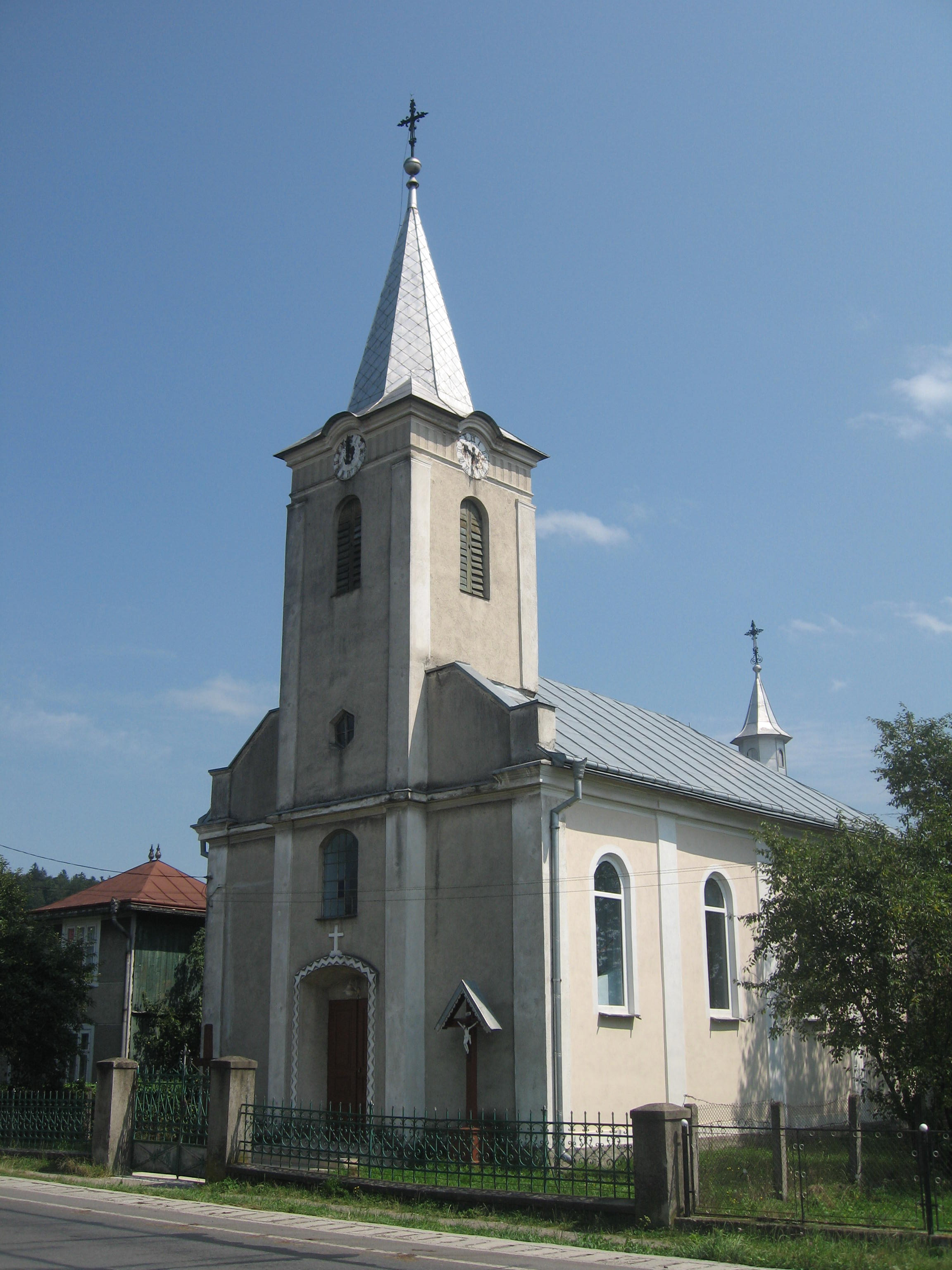 Biserica romano-catolica din Paltinoasa